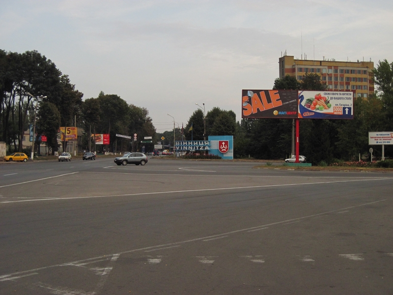 В'їзд у Вінницю. Хмельницьке шосе: В'їзд у Вінницю. Хмельницьке шосе. Зліва адмінспоруда заводу "Маяк"